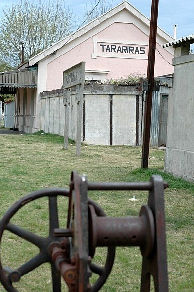 Estacion de Trenes. Tarariras, Colonia, Uruguay